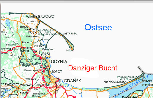 Karte der Danziger Bucht selbst erstellt, GFDL, Ursprung: (Wikipedia public domains) Benutzer:Rdb